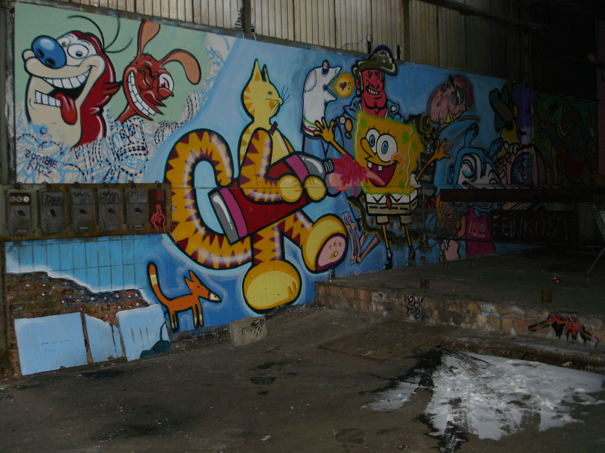 Wand voller Graffiti in einem Hinterhof in Leipzig